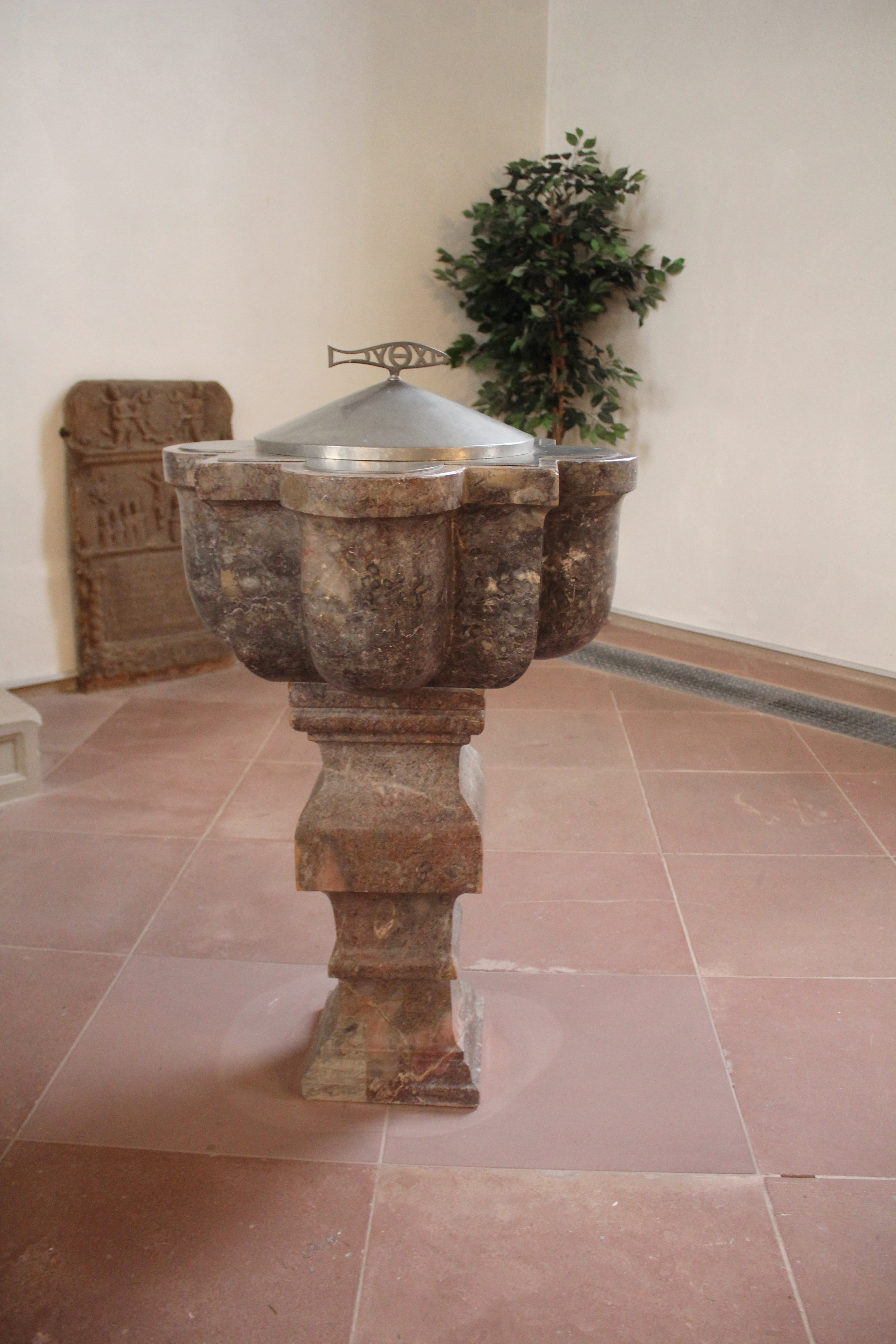 Evangelische Kirche Merlau, Gemeinde Mücke, Vogelsbergkreis, Hessen, Deutschland